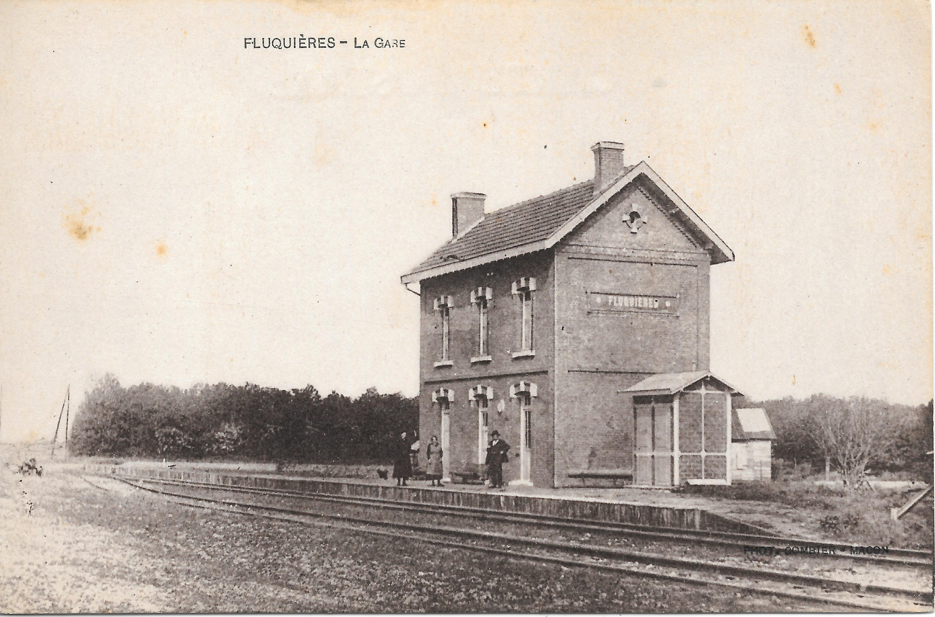 La gare de Fluquières vers 1910